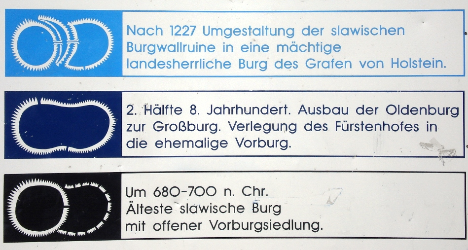 Ausschnitt Schild am Oldenburger Wall